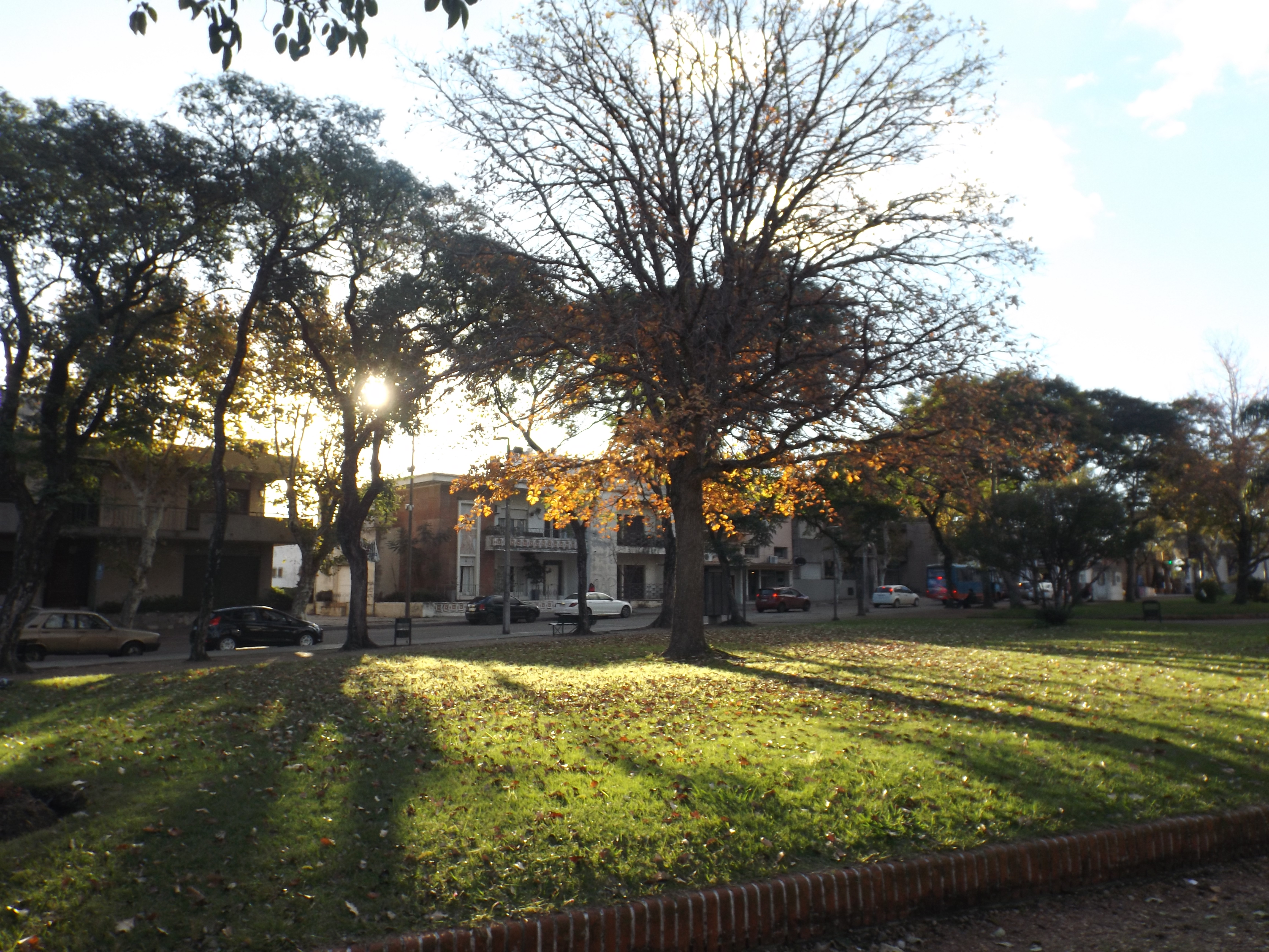 foto tomada desde Plaza Artigas